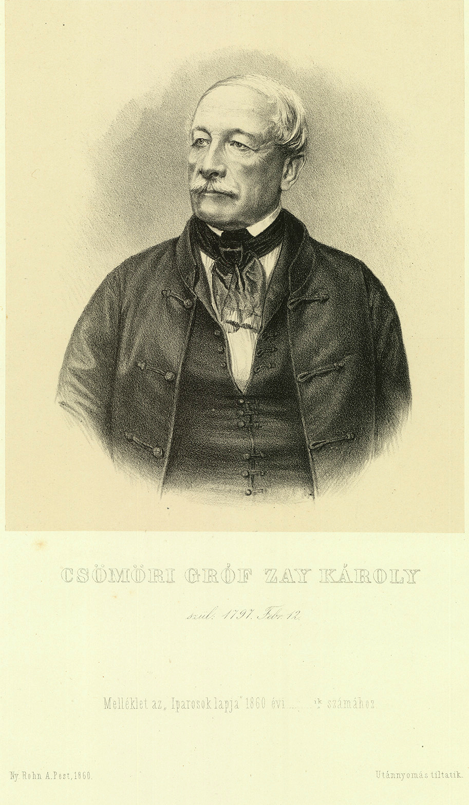 Csömöri gróf Zay Károly Miksa (Sopron, 1797. február 12. – Bucsány, 1871. október 8.) gróf, szabadelvű politikus, császári és királyi kamarás, evangélikus egyházi főfelügyelő.